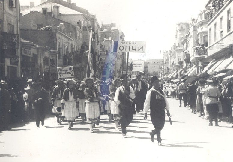 4-ти селскостопански културен и национален събор, 28 - 29 август 1938 г., гр. Варна. Парад на участниците в събора по ул. Княз Борис І. В народни носии са представителите на община Топчии.